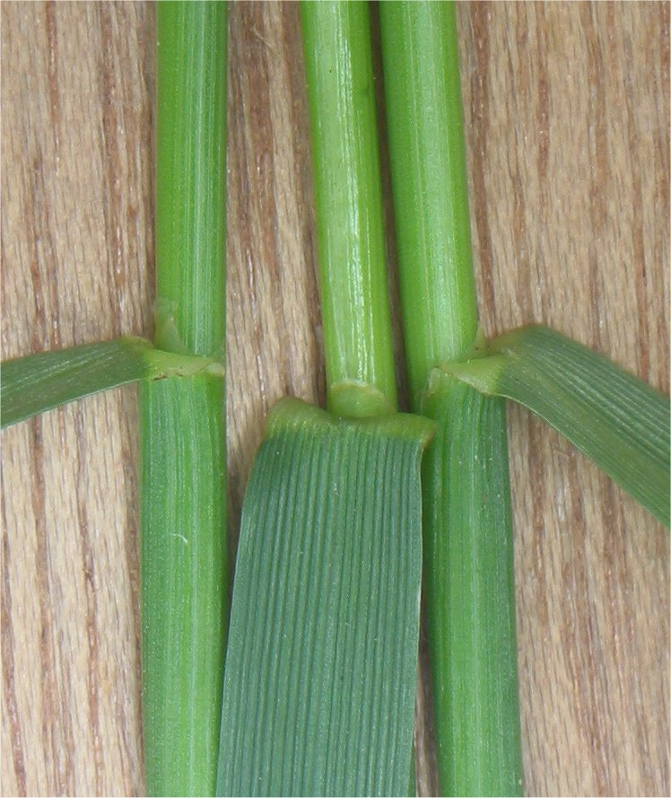 Lolium perenne Engels raaigras ligula